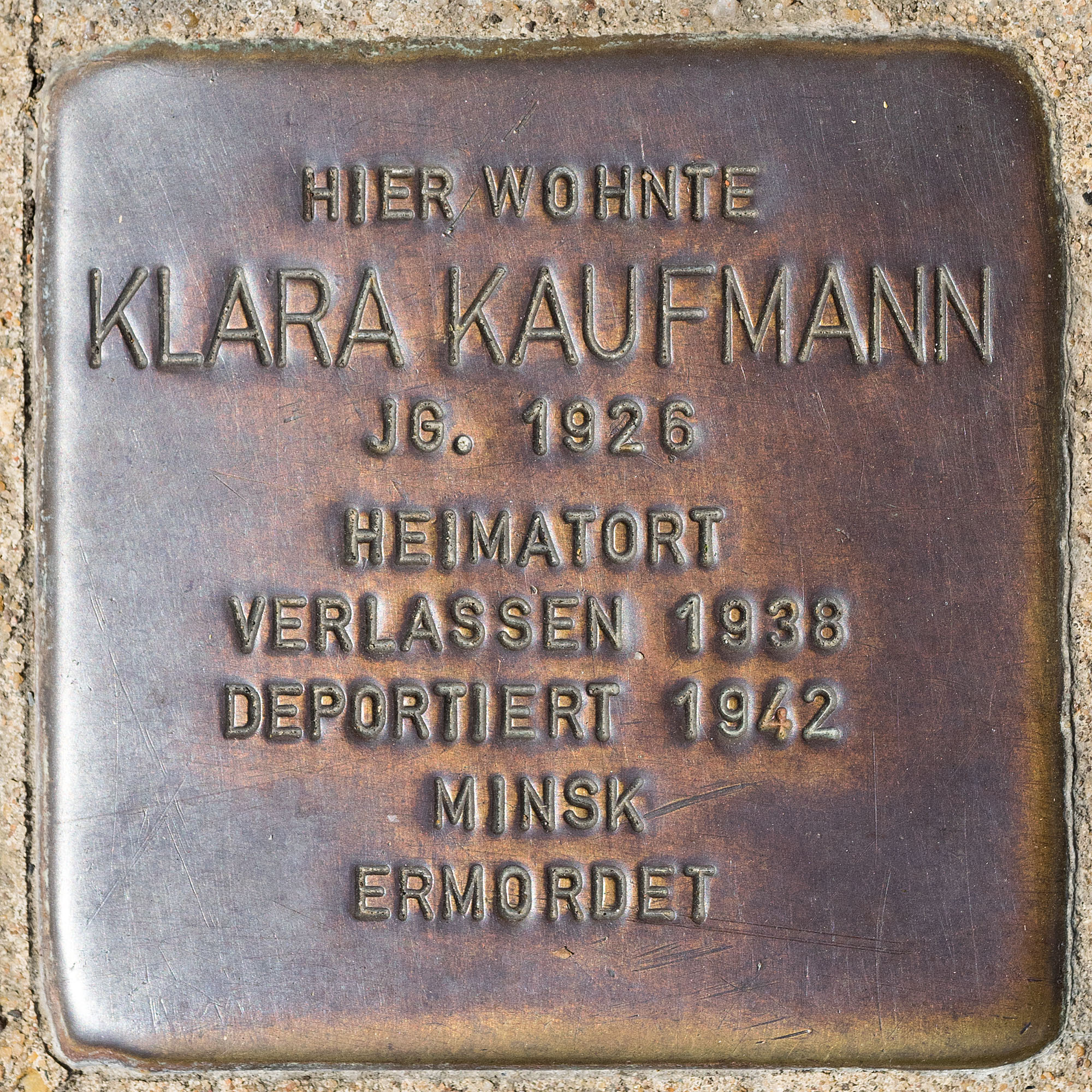 Stolpersteine Roki: Kaufmann, Klara